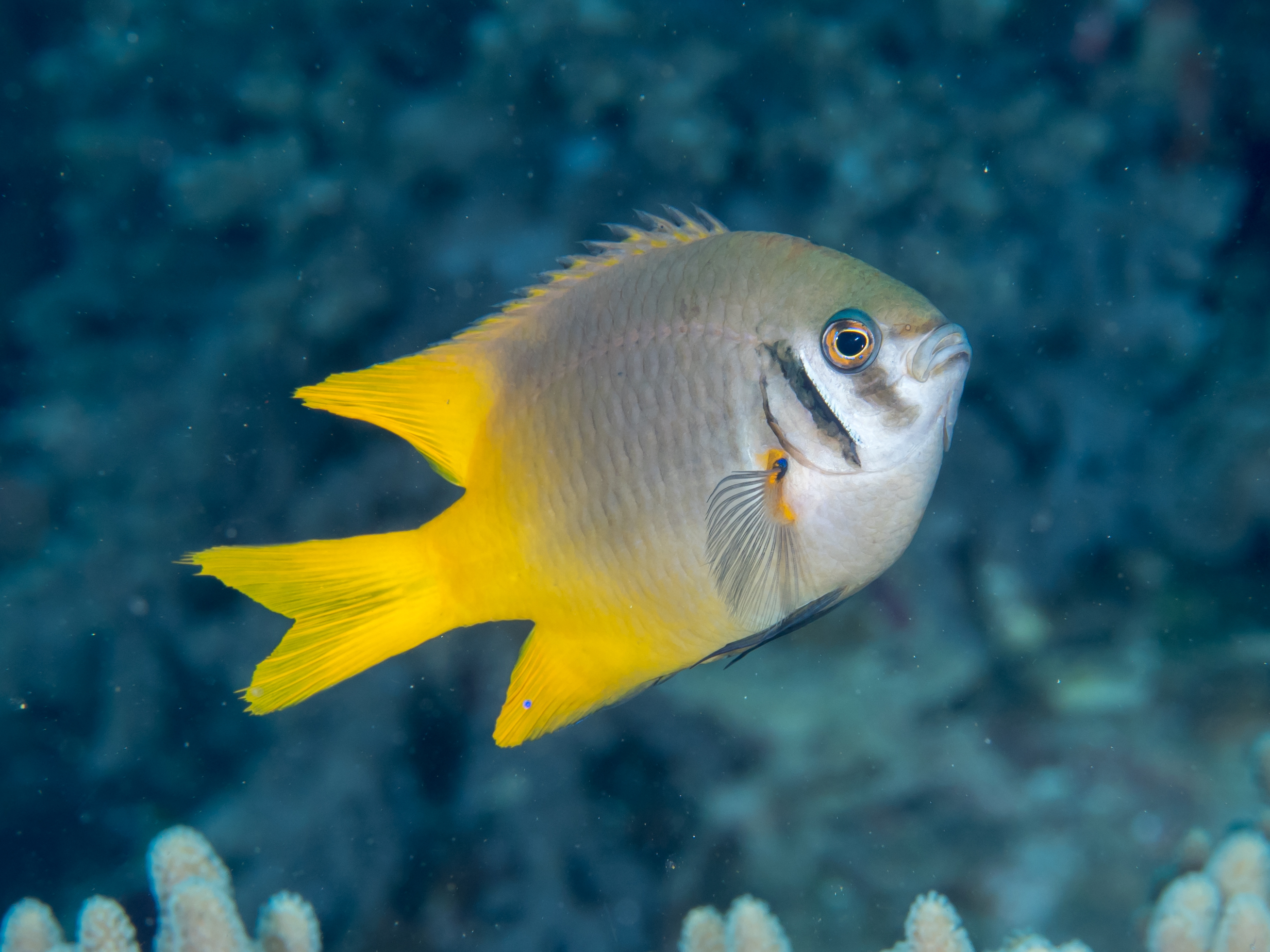 Scarface damsel (Neoglyphidodon nigroris). Raja Ampat